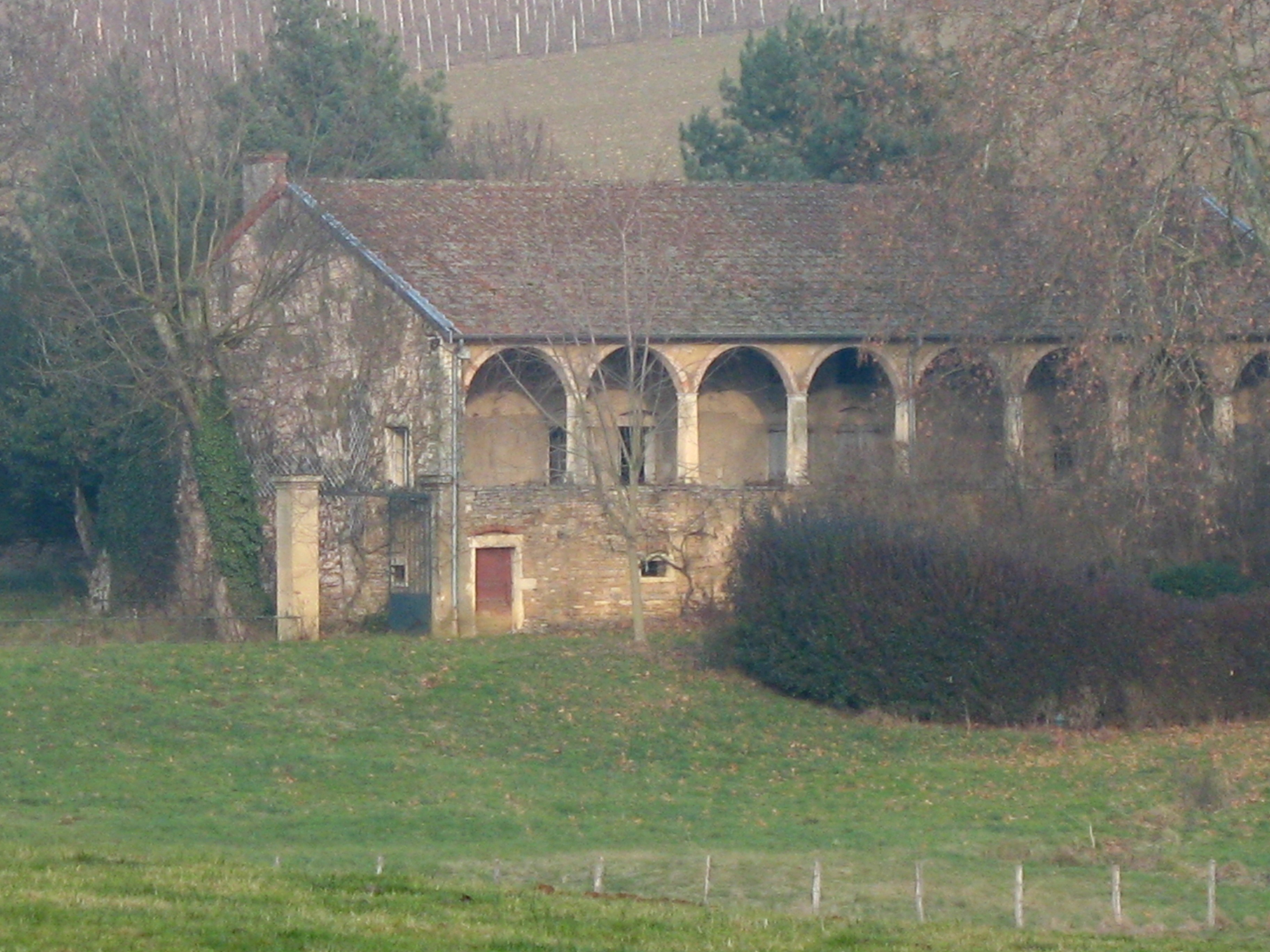 château de Vaux-sous-Targe - Péronne (Saône-et-Loire)